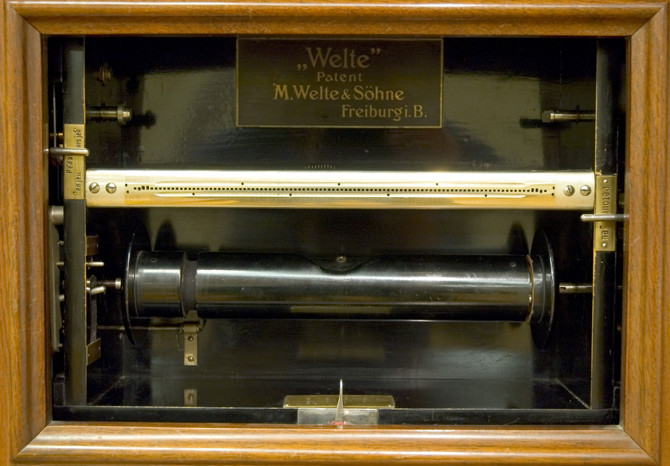 Trackerbar of a Welte-Mignon T 98 piano (Buffalo Convention). Skalenblock eines Welte-Mignon nach der Buffalo Convention. Eigene Aufnahme.